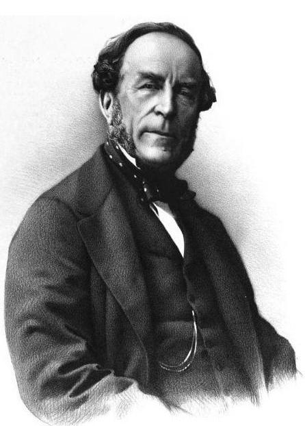 Ludovic Vitet